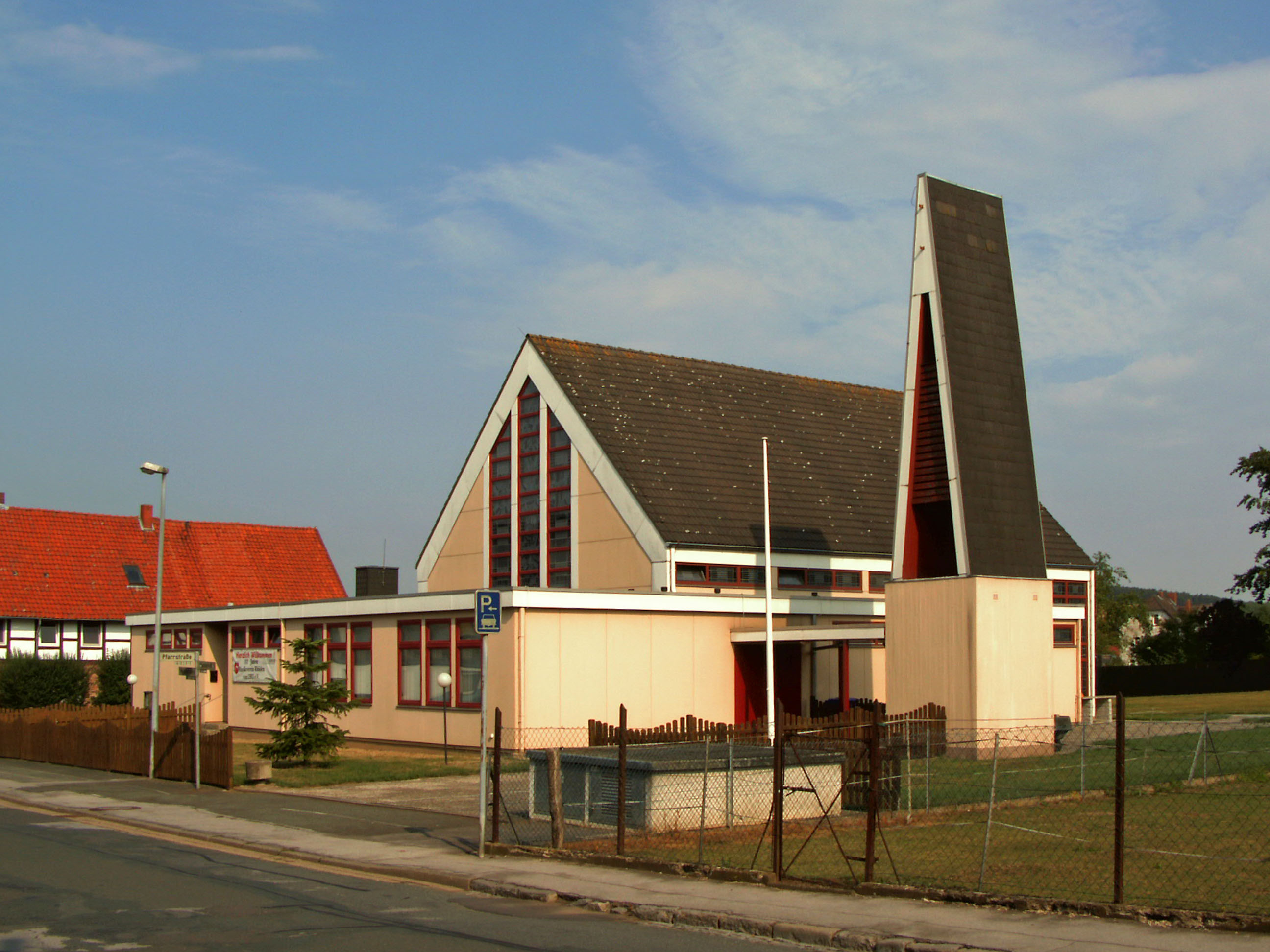 Vereinsheim des Musikvereins in Rhüden, Ortsteil von Seesen am Harz (ehemalige katholische St.-Oliver-Kirche)